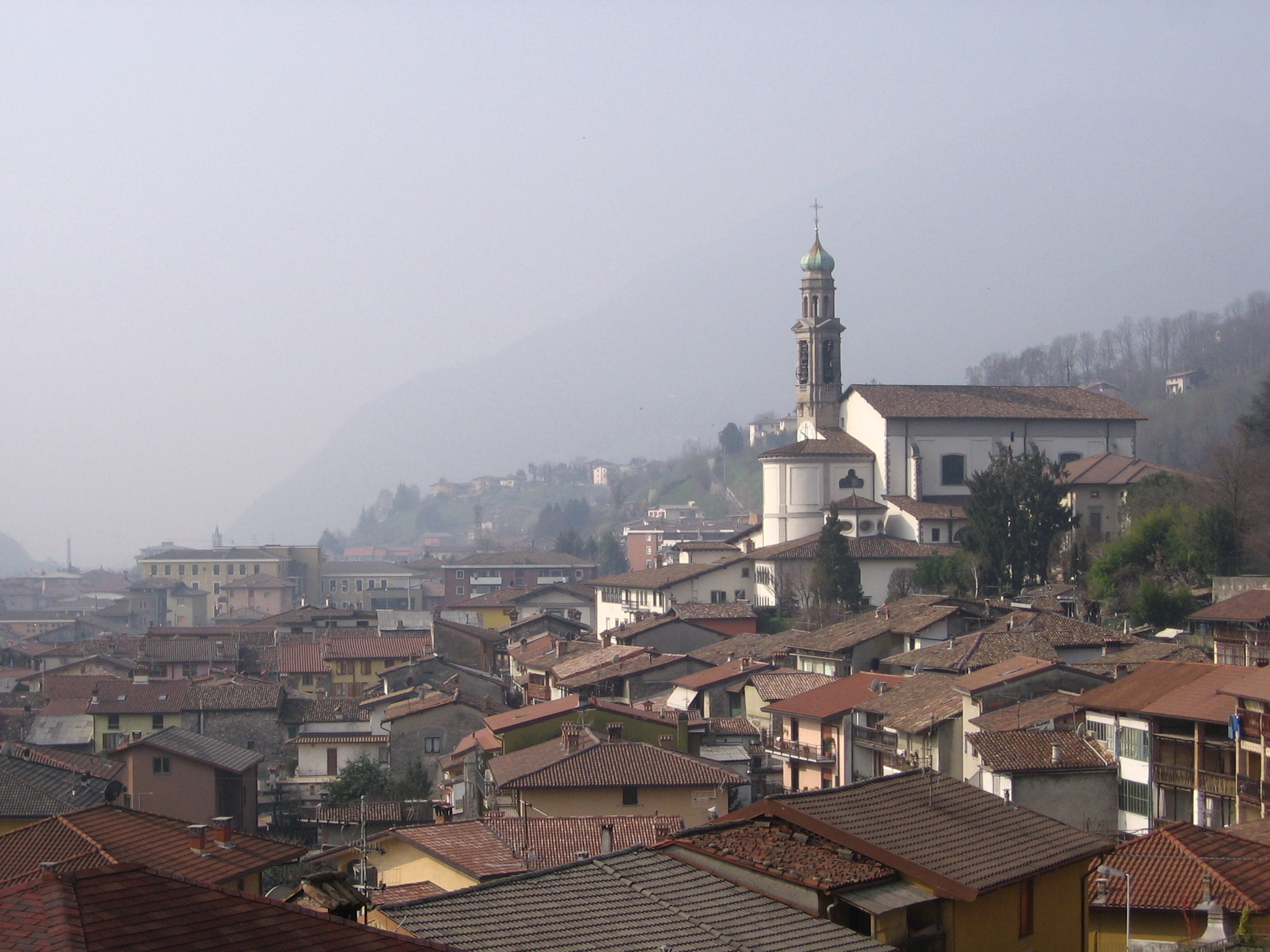 Vertova, Bergamo, Italia